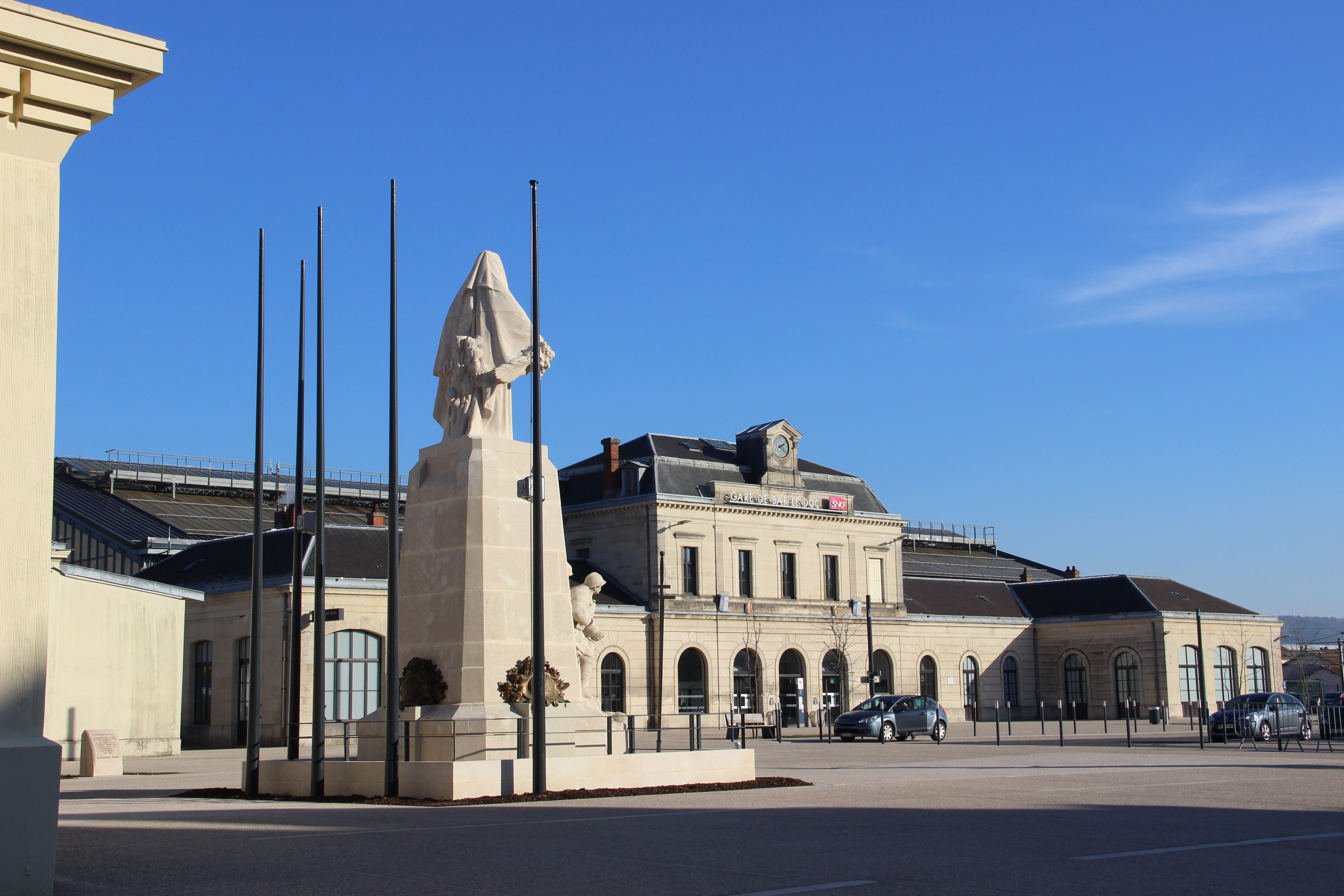 La gare de Bar-le-Duc et le monument aux morts (déplacé en 2016), département de la Meuse, France.